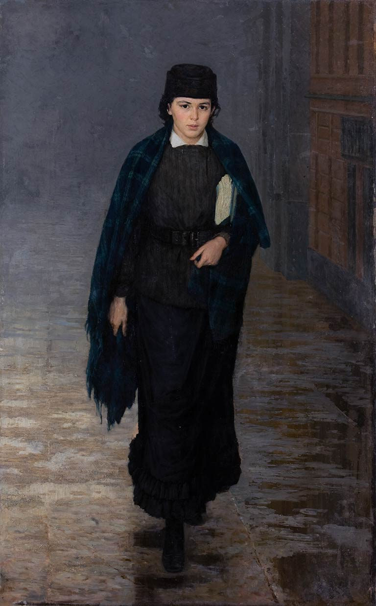 Student girl.label QS:Len,"Student girl." label QS:Lru,"Николай Ярошенко. Курсистка."